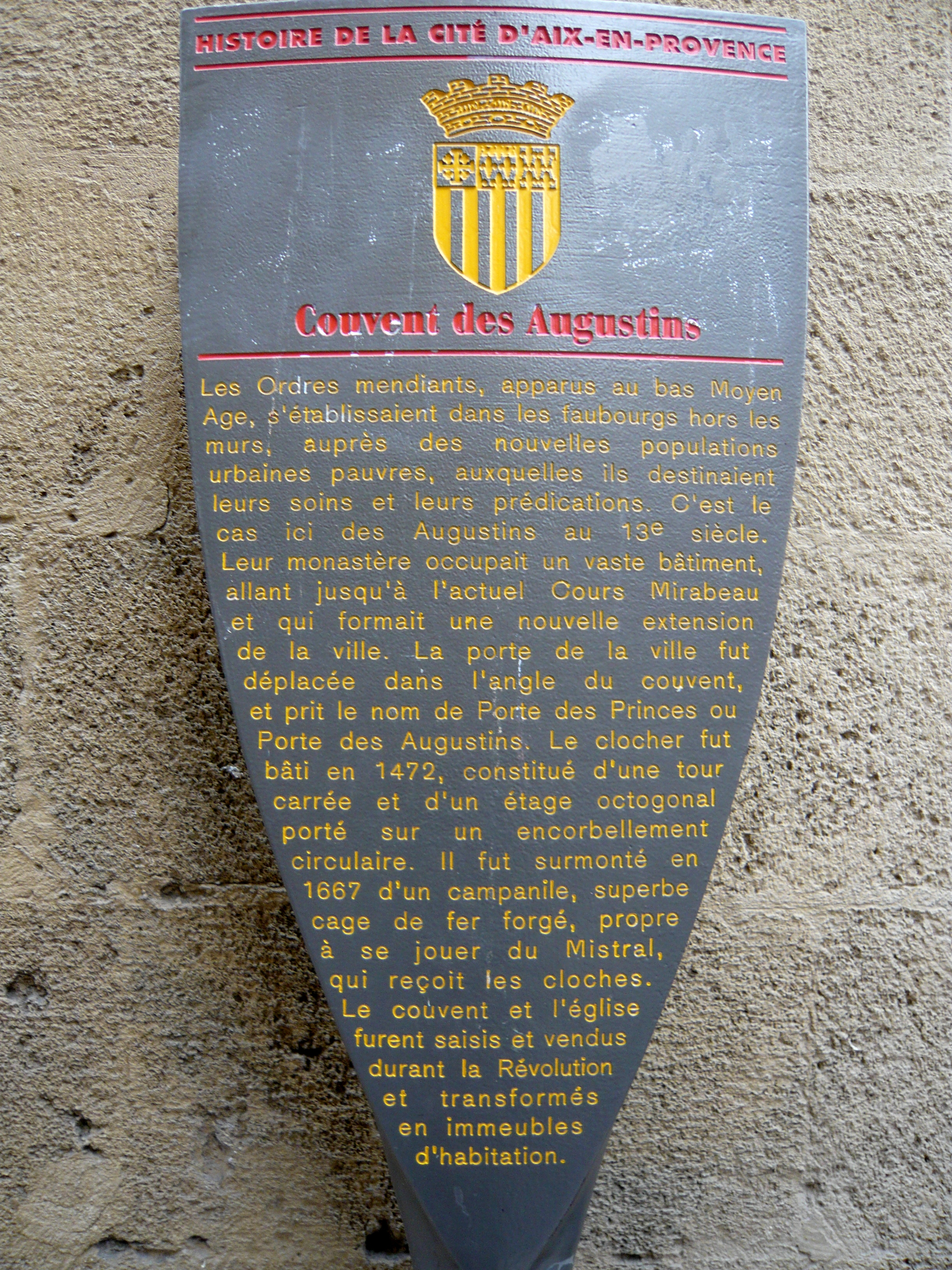 Potelet de l'ancien couvent des Augustins, 51-53 rue Espariat, Aix-en-Provence (France). Les Ordres mendiants, apparus au bas Moyen Age, s’établissaient dans les faubourgs hors les murs, auprès des nouvelles populations urbaines pauvres, auxquelles ils destinaient leurs soins et leurs prédications. C’est le cas ici des Augustins au 13e siècle. Leur monastère occupait un vaste bâtiment, allant jusqu’à l’actuel Cours Mirabeau et qui formait une nouvelle extension de la ville. La porte de la ville fut déplacée dans l’angle du couvent, et prit le nom de Porte des Princes ou Porte des Augustins. Le clocher fut bâti en 1472, constitué d’une tour carrée et d’un étage octogonal porté sur un encorbellement circulaire. Il fut surmonté en 1667 d’un campanile, superbe cage de fer forgé, propre à se jouer du Mistral, qui reçoit les cloches. Le couvent et l’église furent saisis et vendus durant la Révolution et transformés en immeubles d’habitation.